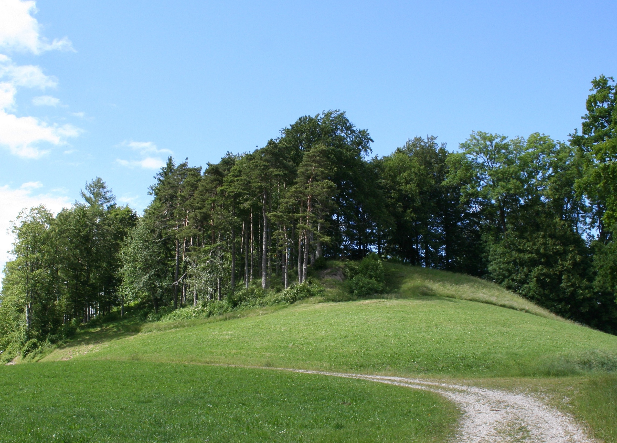 Ruine Hohenlandenberg Burghügel